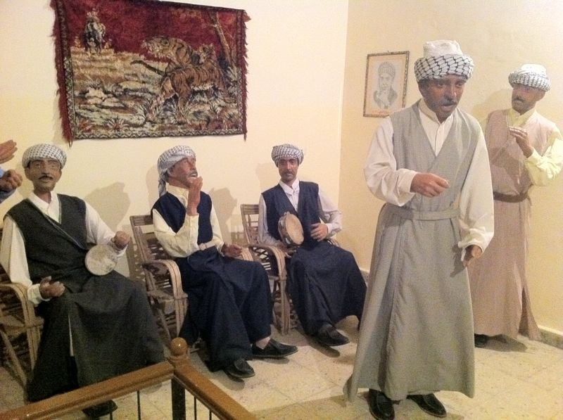 مجسمات لفرقة شعبية موسيقية عراقية في المتحف البغدادي